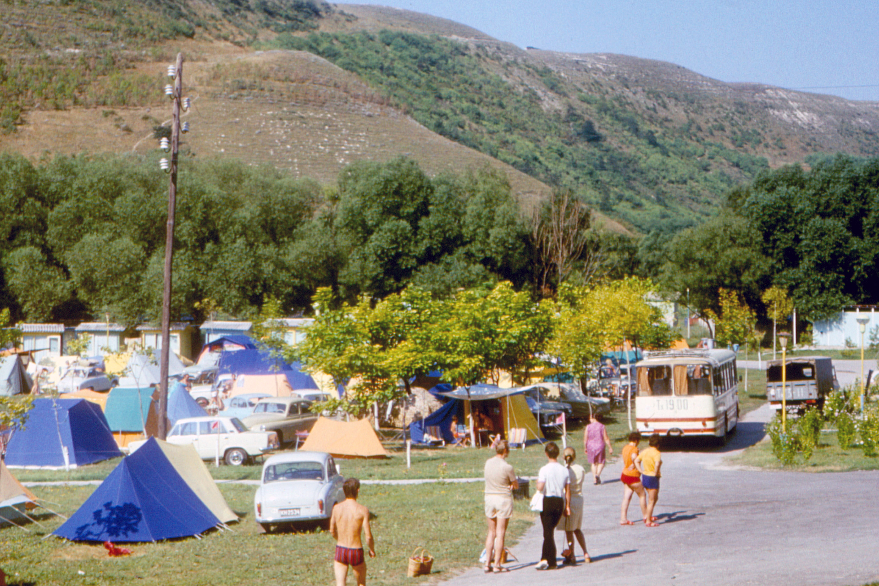 Der Campingplatz von Kawarna ist im August 1972 voll belegt.